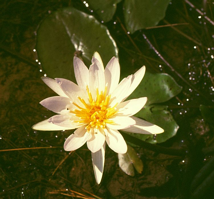 Nymphaea nouchali, Seerosengewächse (Nymphaeaceae) - Kambodscha/Cambodia, Angkor Wat (Prov. Siem Reap)